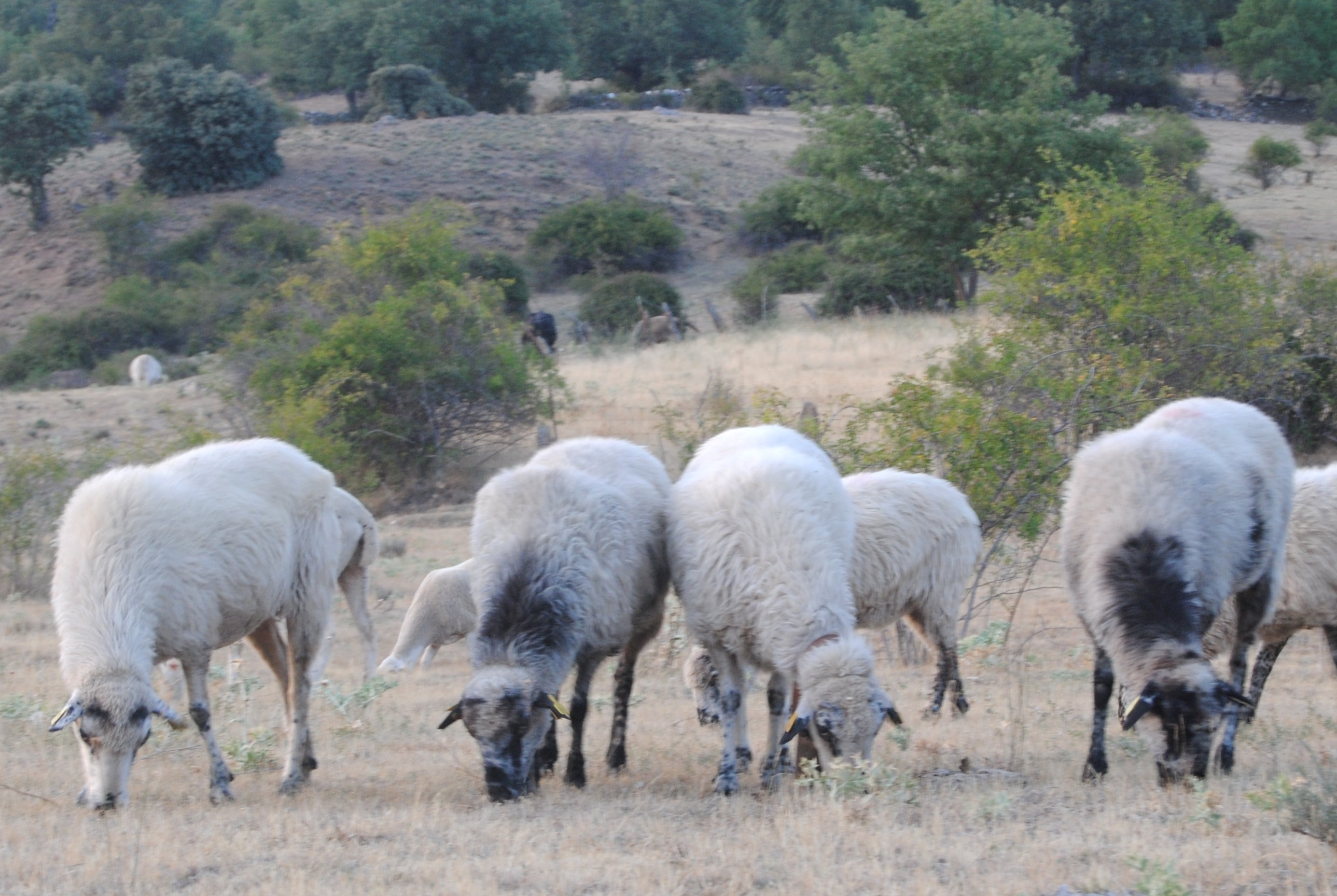 Grupo de ovejas colmenareñas pastando.